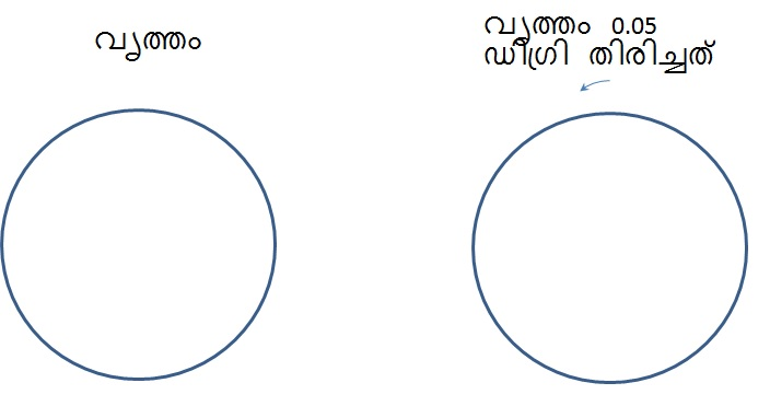 വൃത്തം 0.01 ഡിഗ്രി തിരിച്ചത്